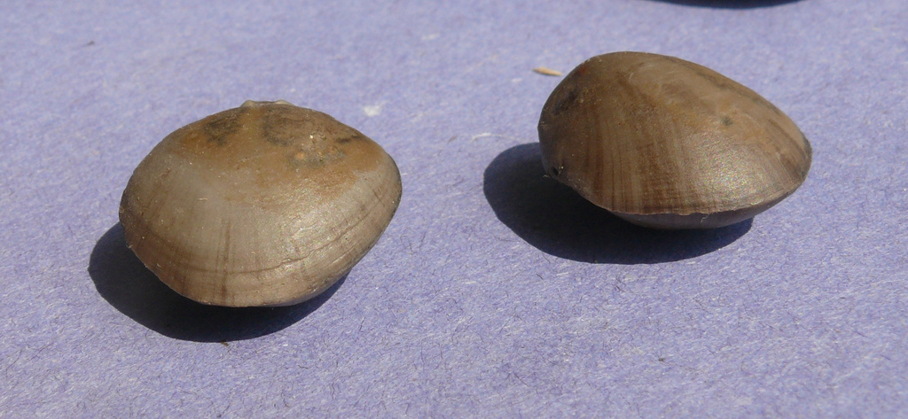 Coenothyris vulgaris (Syn. Terebratula vulgaris) aus der Trochitenkalk-Formation, Crailsheim-Subformation Hohenlohe, Deutschland